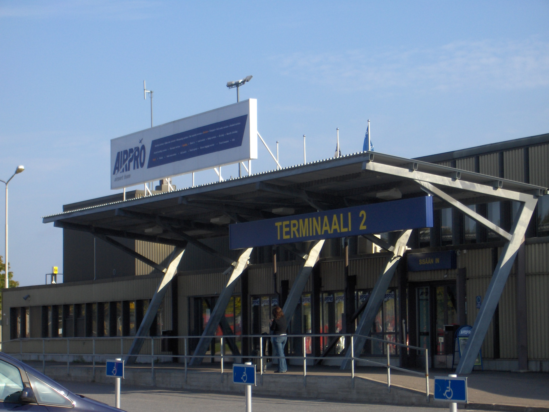 Tampere-Pirkkala airport terminal 2